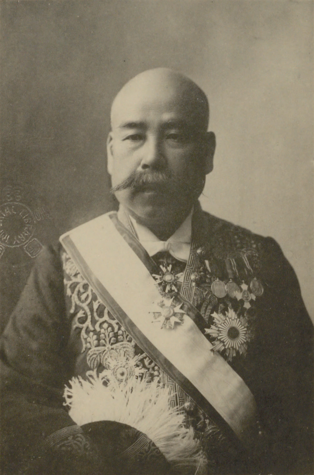 Portrait of Egi Kazuyuki (江木千之, 1853 – 1932)